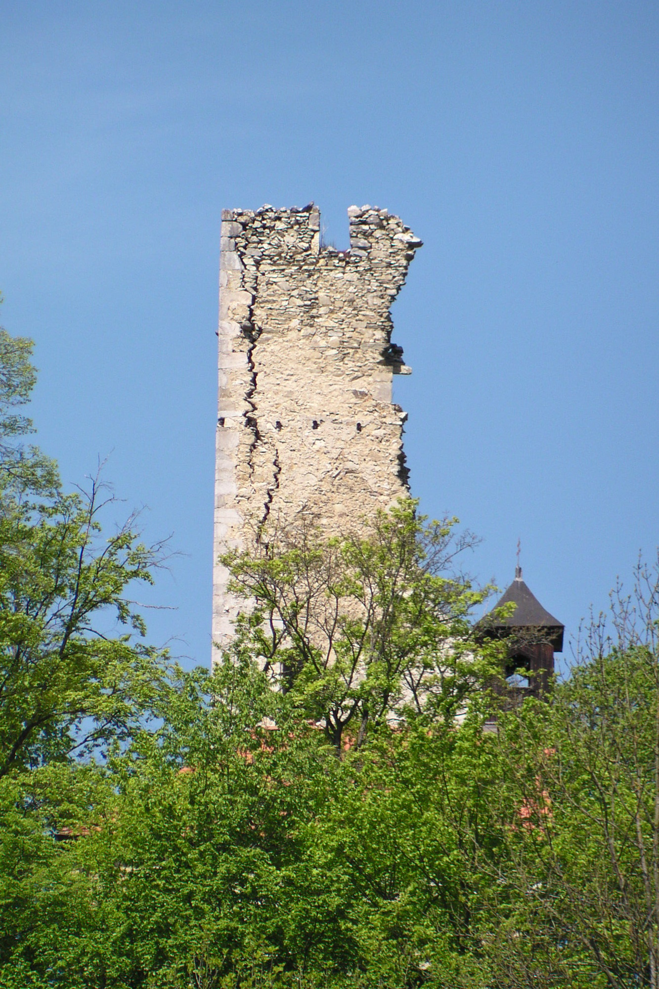 Burgruine Wolfstein, Gemeinde Schönbühel-Aggsbach.